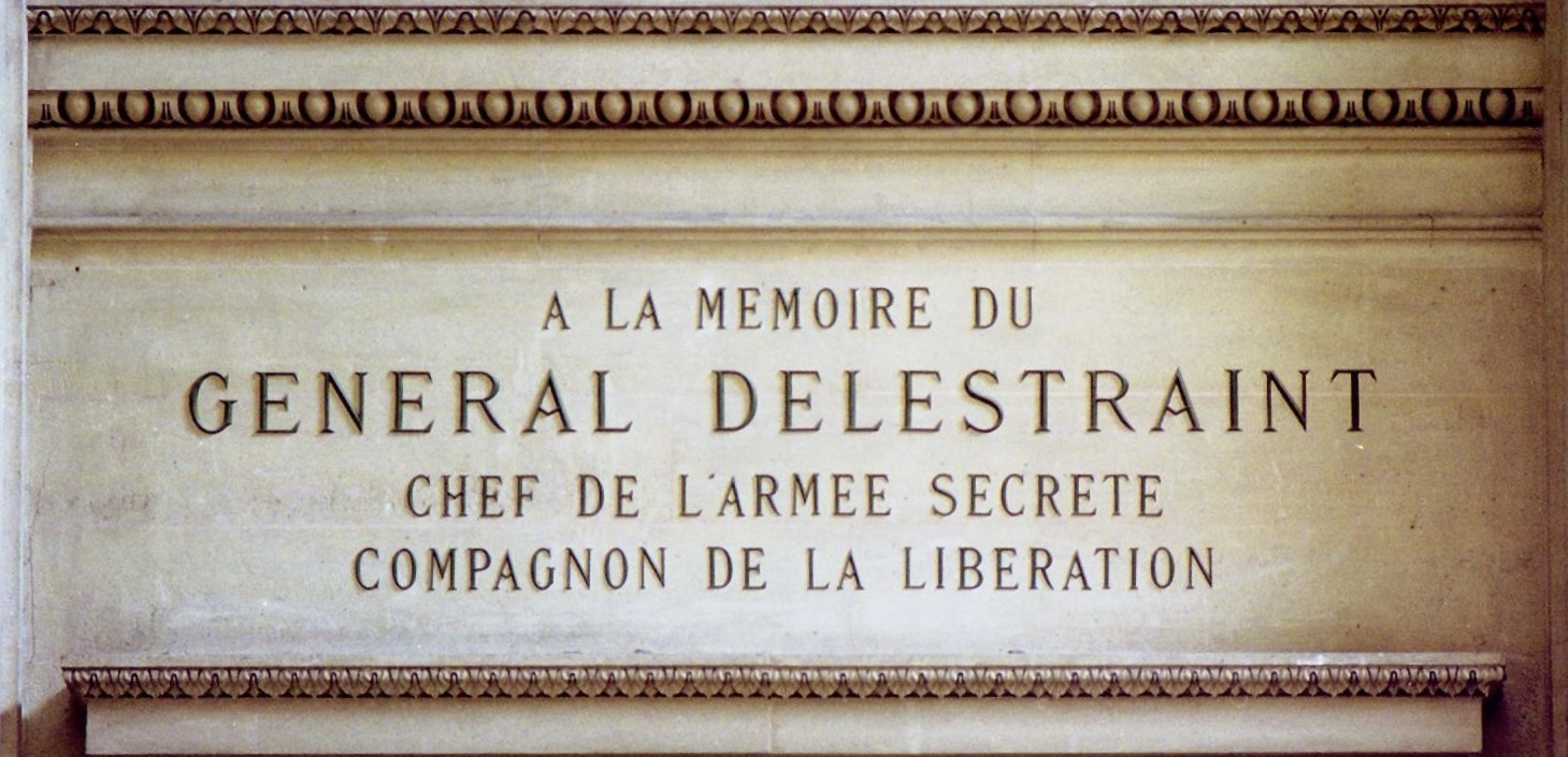 Inscription à la mémoire de Charles Delestraint sur les murs du Panthéon de Paris